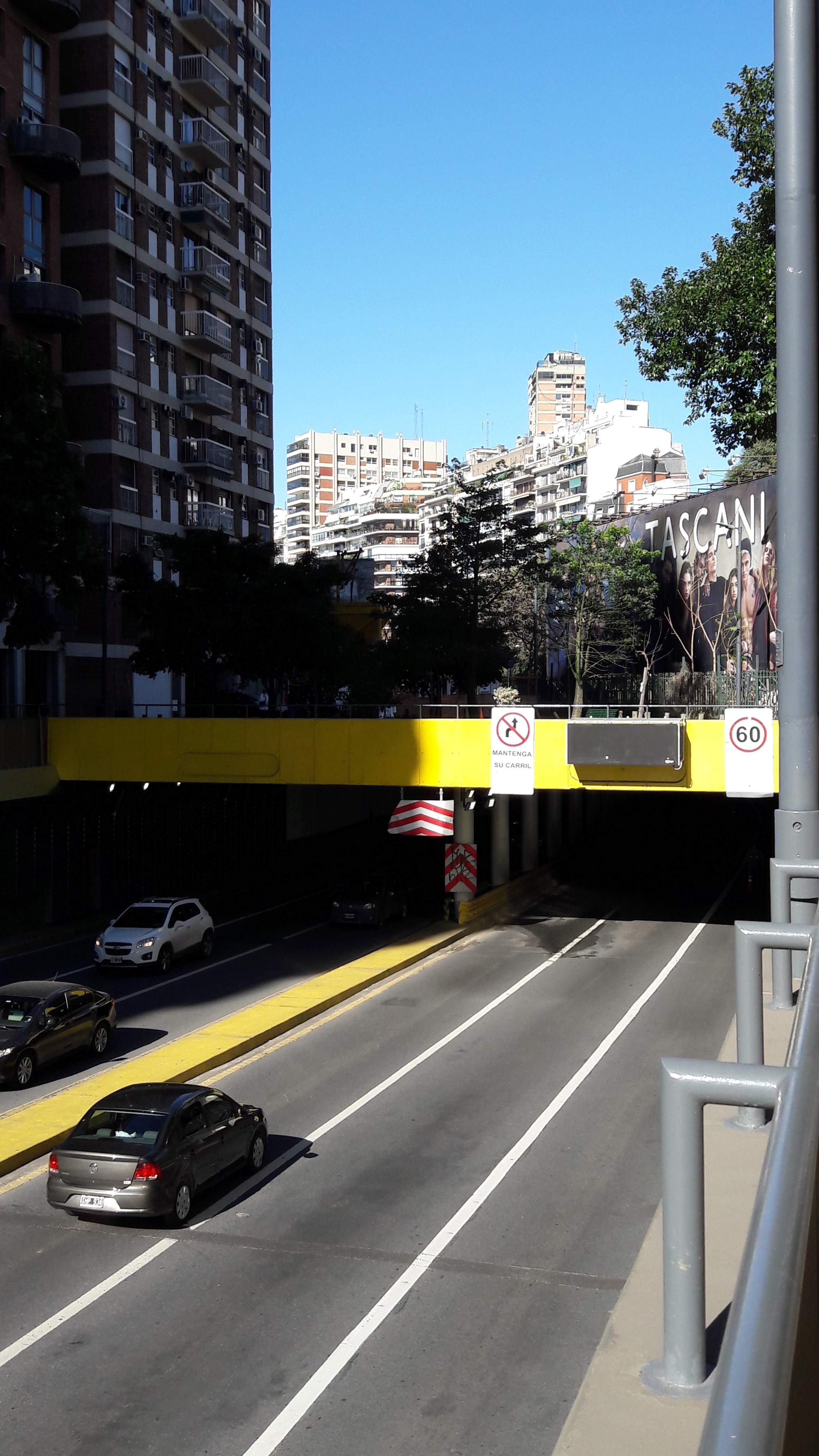 Acceso norte al Túnel de la Avenida Libertador, Belgrano, CABA.